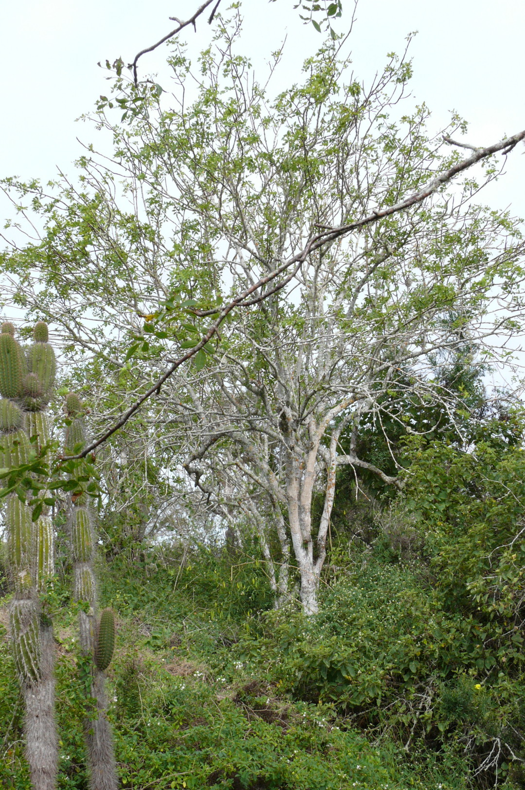 Palo Santo (Bursera graveolens)